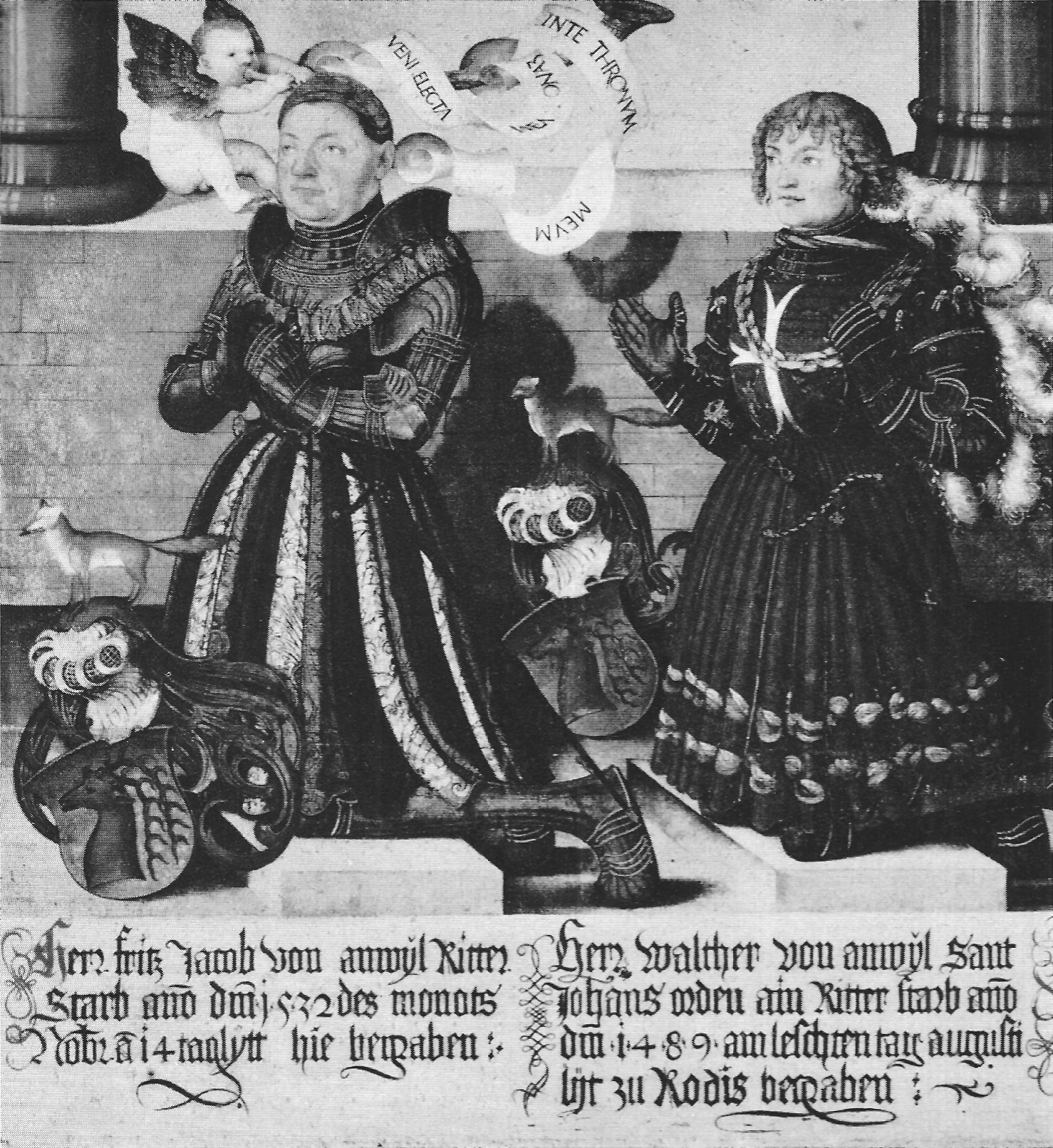 Anweiler Epitaph (Ausschnitt): Jacob von Anwyl († 1532) und Walther von Anwyl († 1489). Hier wird ein Ausschnitt des Epitaphs gezeigt; eine vollständige farbige Abbildung findet sich auf der Homepage der Stuttgarter Staatsgalerie [1]. Eine Beschreibung findet sich bei Siegfried Graf Pückler-Limpurg: Martin Schaffner (=Studien zur Deutschen Kunstgeschichte. Heft 20). Straßburg 1899, S. 17-18 [2]